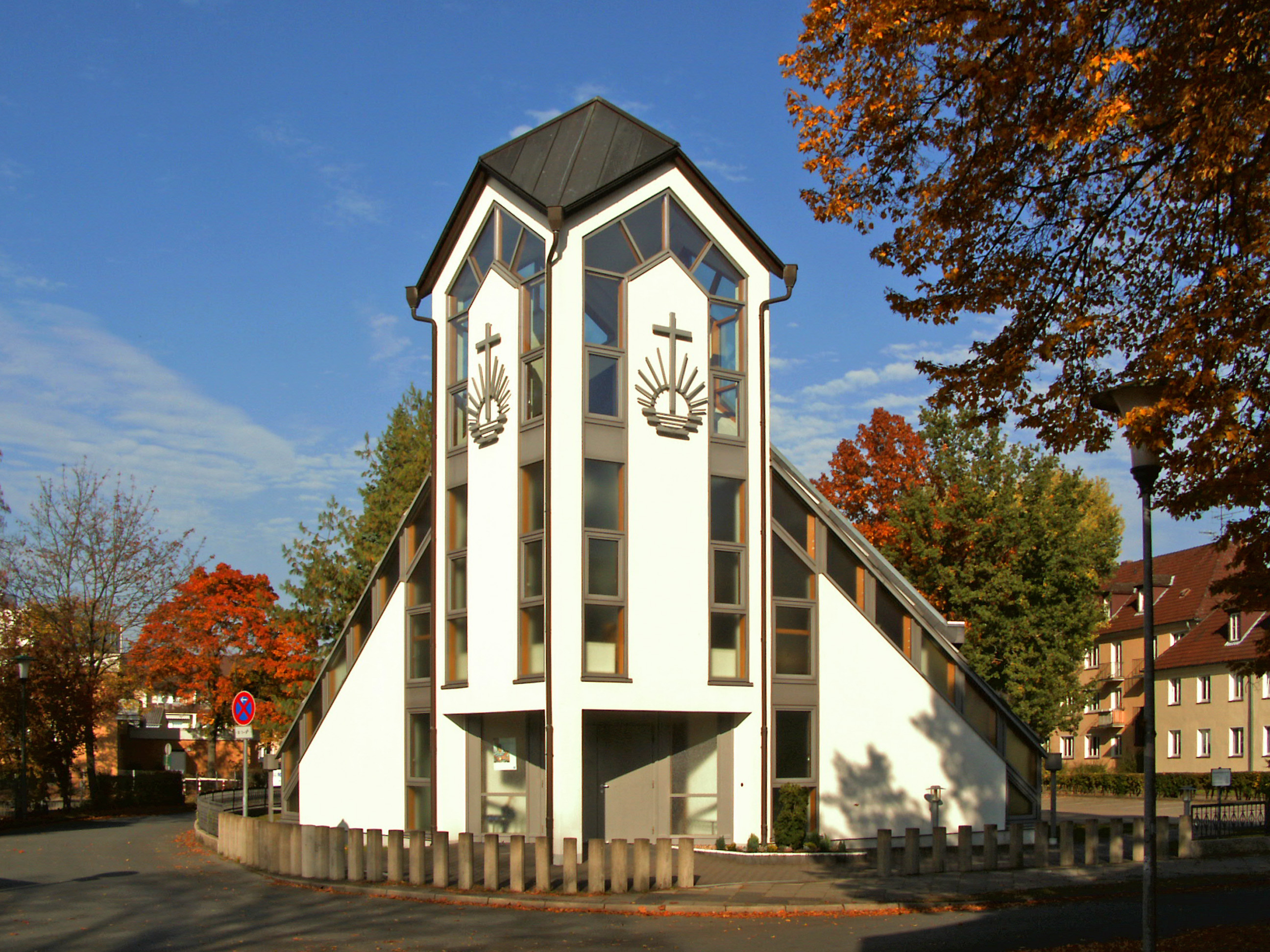 Neuapostolische Kirche in Wolfsburg